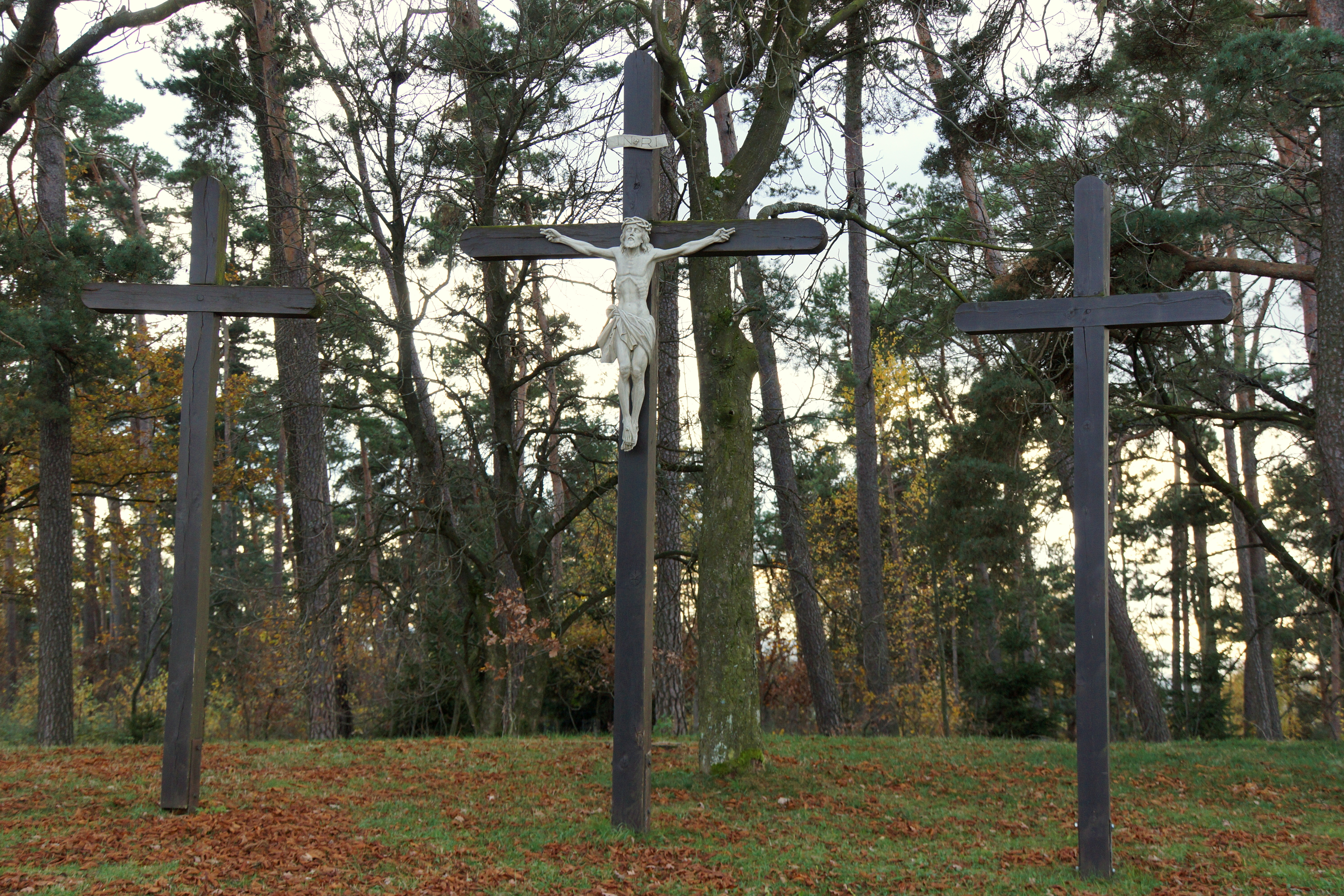 Der Möninger Berg im Westen des Oberpfälzer Landkreises Neumarkt